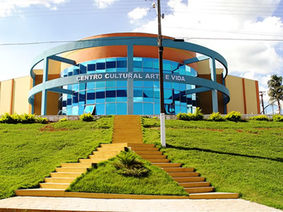 Foto do Centro Cultural Arte e Vida, na cidade de Dois Vizinhos, no Paraná.